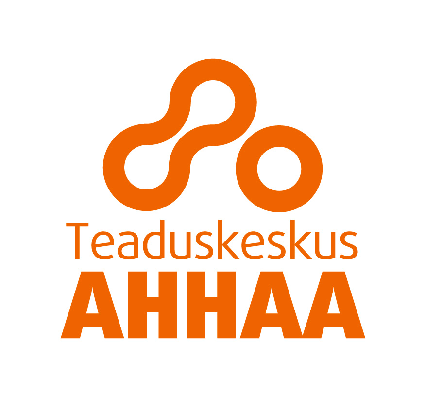 Teaduskeskus AHHAA logo